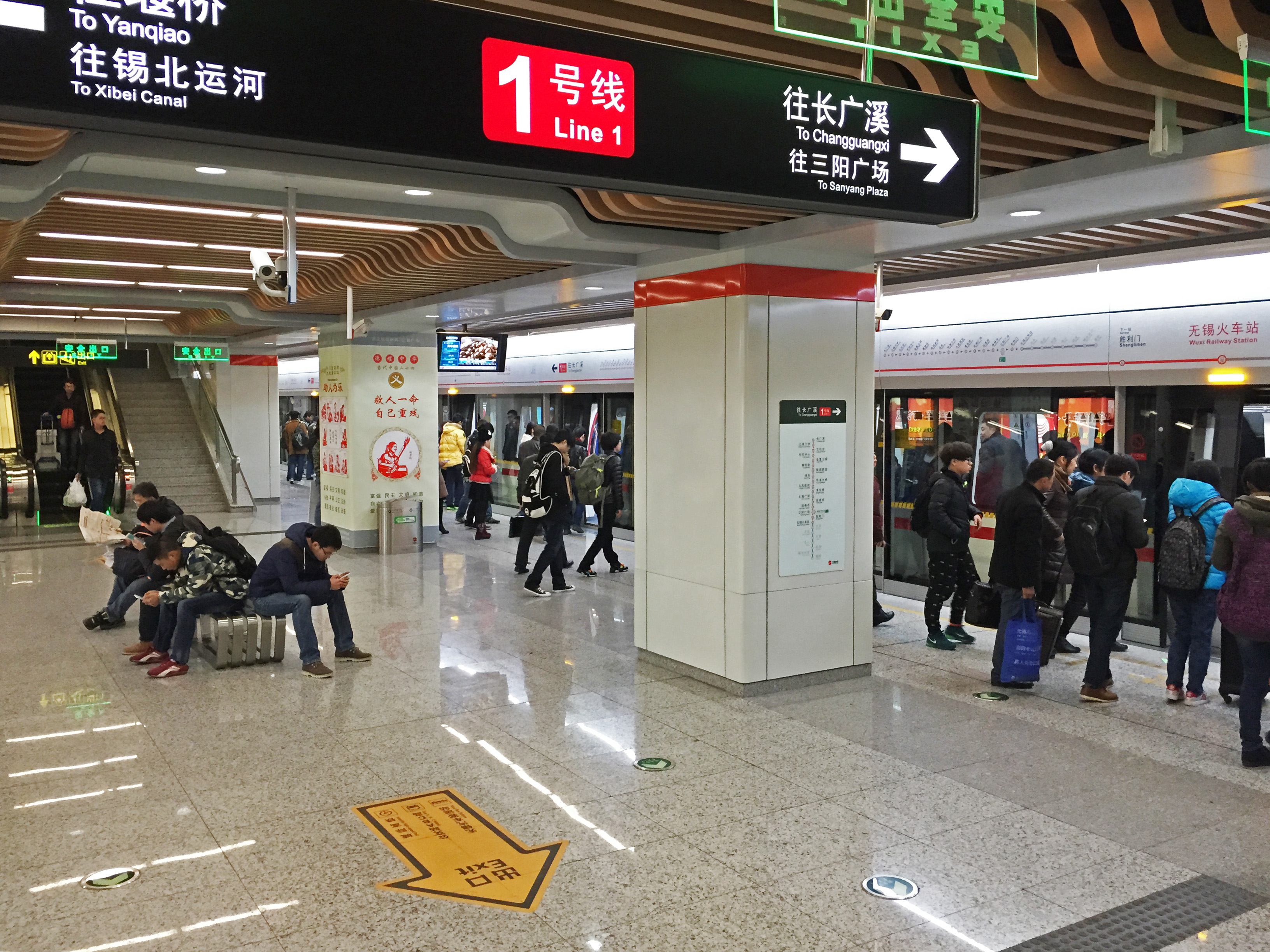 無錫地鐵無錫火車站站臺